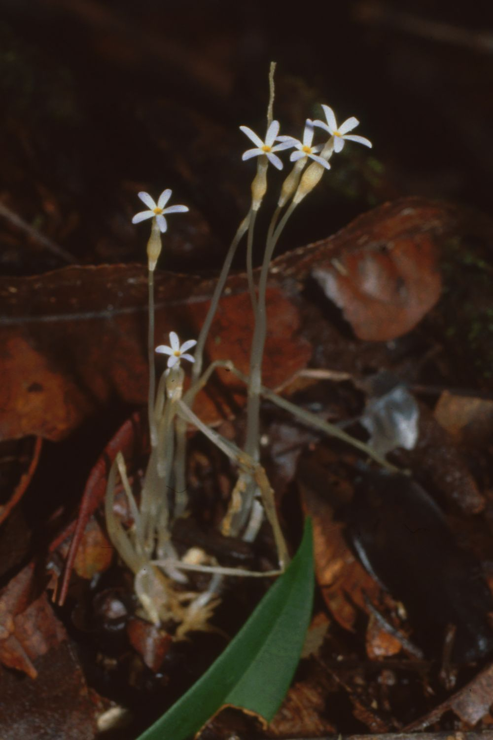 Voyria tenella, Enziangewächse (Gentianaceae) - Costa Rica: Prov. Puntarenas, PN Piedras Blancas, Bosque Esquinas bei La Gamba